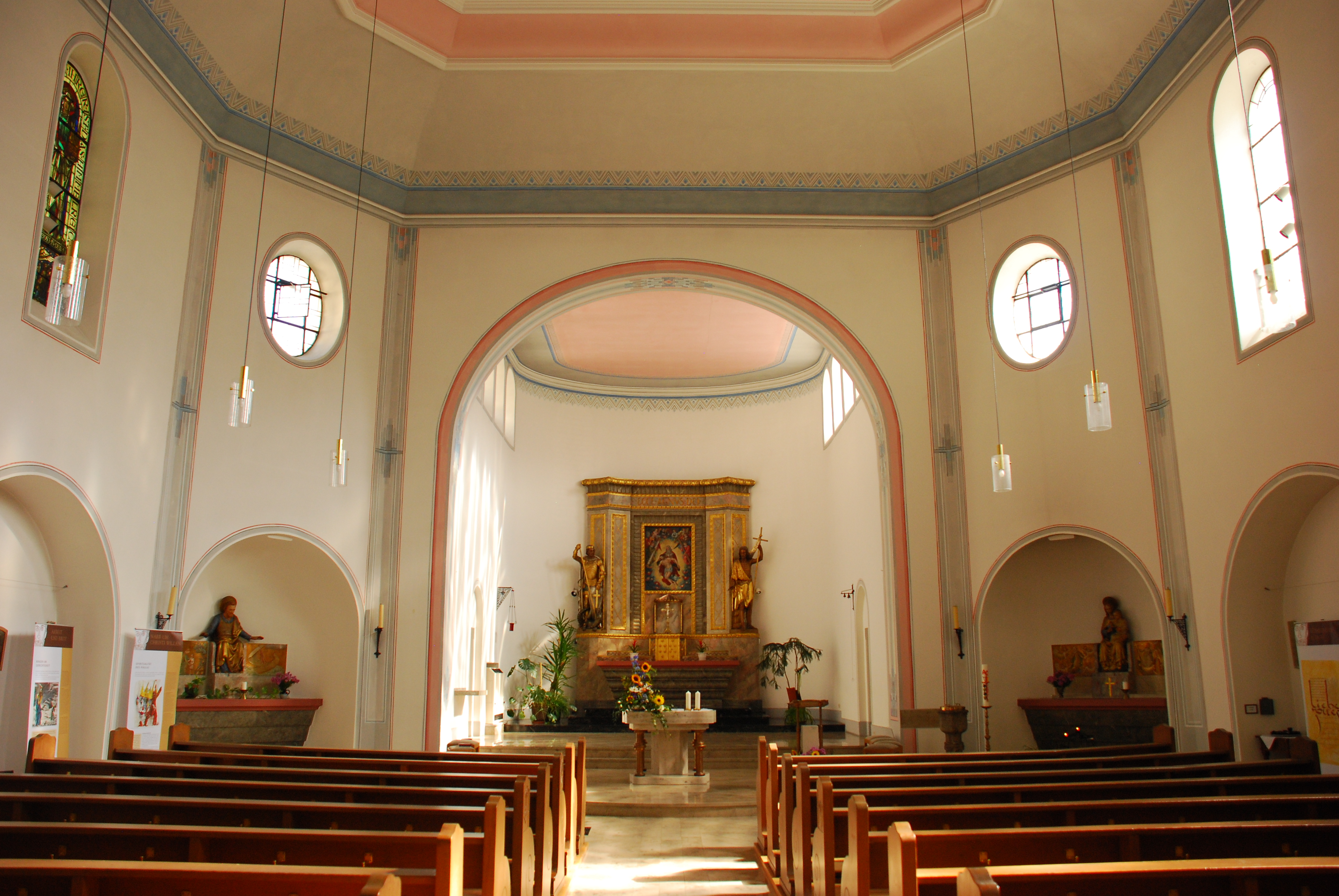 Altarbereich der katholischen Pfarrkirche St. Johannes der Täufer in Sankt Goarshausen, Rhein-Lahn-Kreis, Rheinland-Pfalz. Bauwerk als Denkmal im nachrichtlichen Verzeichnis der Kulturdenkmäler Rhein-Lahn-Kreis aufgeführt.